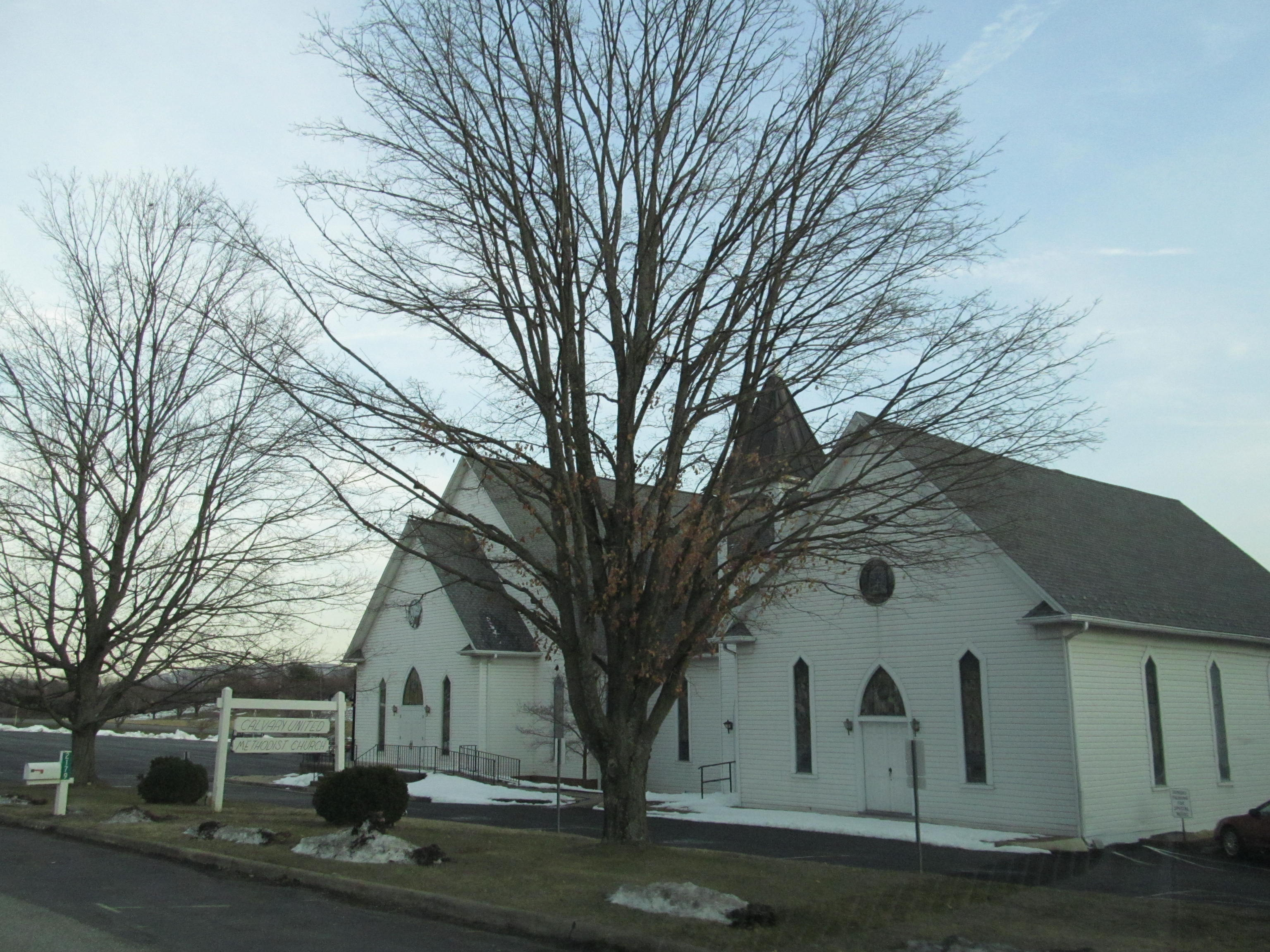 US Route 340 - Virginia